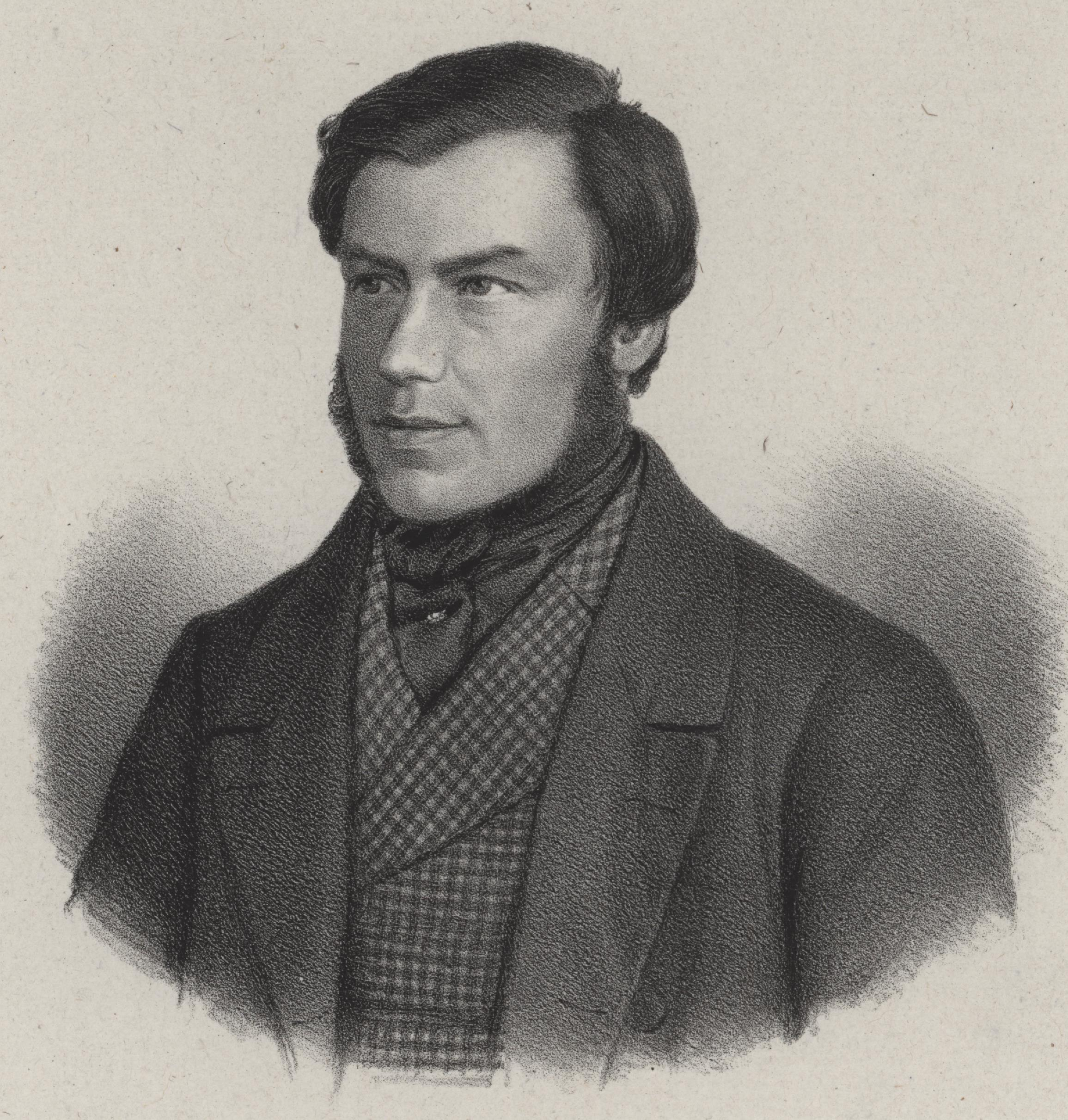 Format: Radering Dato / Date: Ukjent Kunstner / Artist: Ukjent Wikipedia: Christian Martin Monsen (1815 - 1852) Nasjonalbiblioteket: Chr. Monsen - Hvorledes forholder det sig med vor Frihed? Syttende-Mai-Gave for alle tænkende Nordmænd (Christiania 1843) Nasjonalbiblioteket: Chr. Monsen - Throndhjems Mysterier (Throndhjem 1856) [Nytrykk Trondheim 1970] Eier / Owner Institution: Trondheim byarkiv, The Municipal Archives of Trondheim Arkivreferanse / Archive reference: Tor.H49.B03.R1046